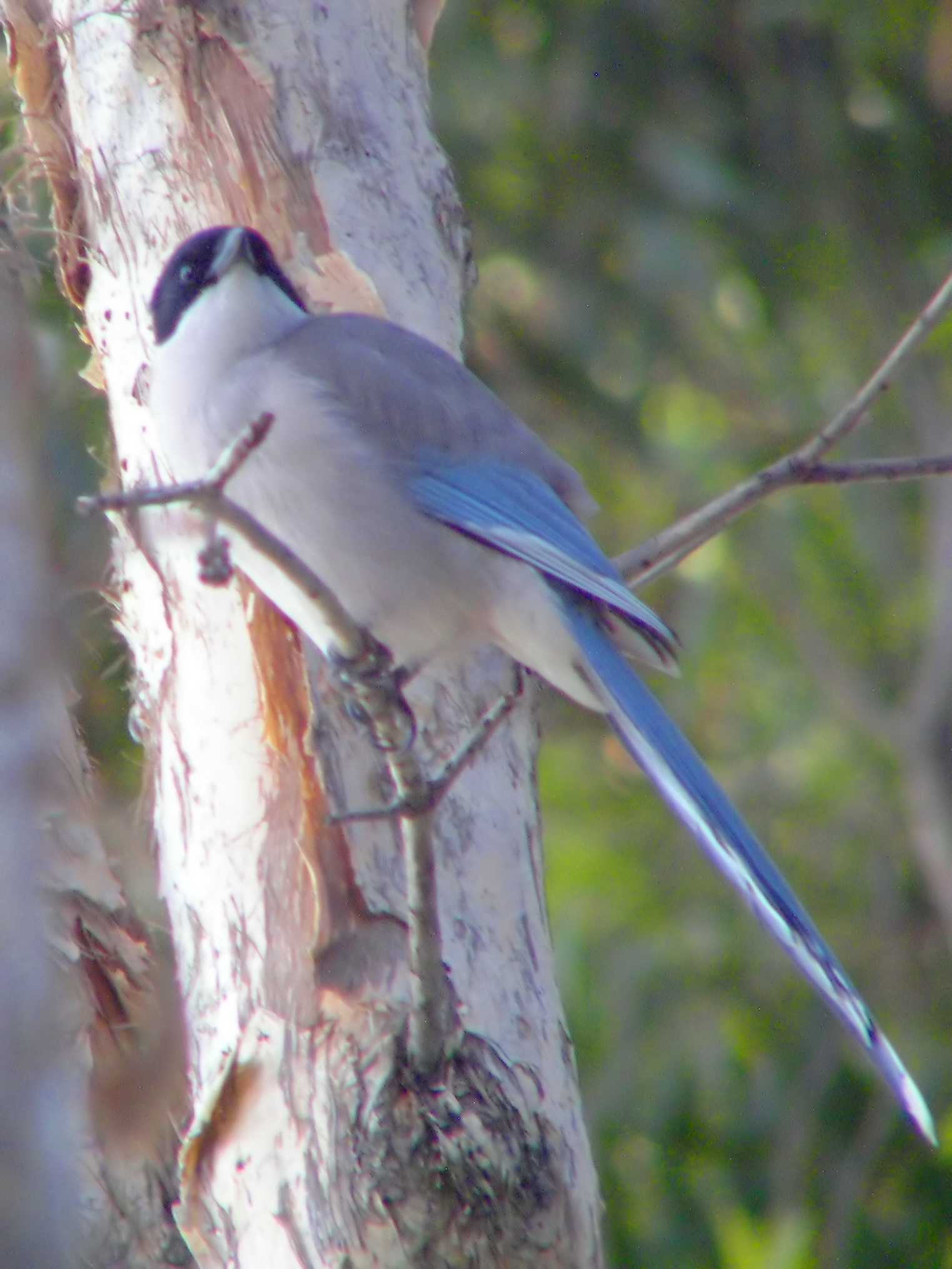 Azure-winged Magpie Cyanopica cyanus, Hong Kong, China.